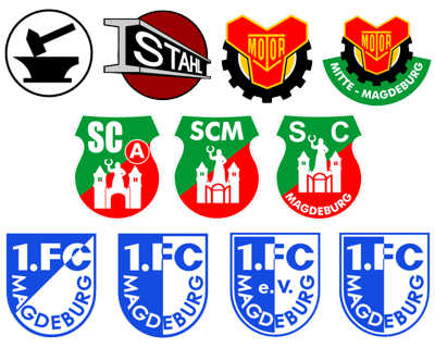 Die Grafik stellt die Logos des 1. FC Magdeburg und seiner Vorgängervereine dar. In der ersten Reihe von links nach rechts: Krupp-Gruson Magdeburg, Stahl Magdeburg, Motor Magdeburg, Motor Mitte Magdeburg. Zweite Reihe: SC Aufbau Magdeburg sowie zweimal SC Magdeburg. Dritte Reihe: Viermal 1. FC Magdeburg: 1. Mitte bis Ende der 1960er Jahre, 2. klassisches Emblem, 3. 1990 kurzzeitig verwendet und 4. modernes Emblem